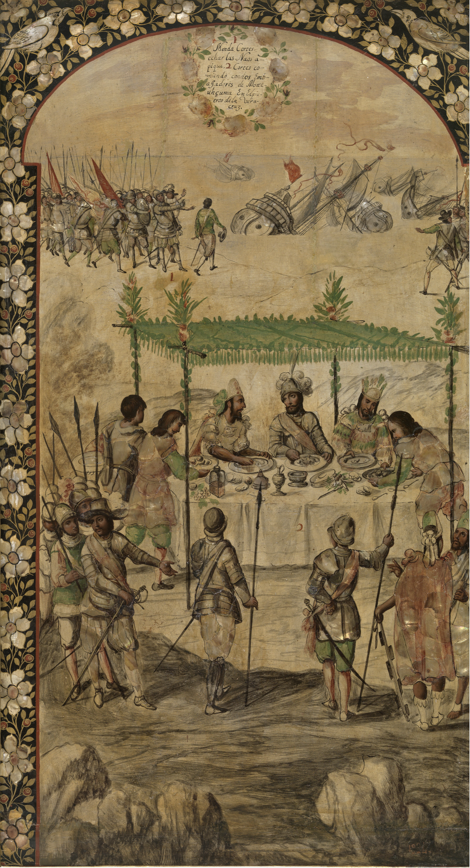 Tabla 1 de las 24 tablas hechas por los artistas novohispanos Juan Gonzálezy Miguel González hablando de la Conquista de México. La tabla representa el momento en el que Cortés hunde a sus naos, en junio de 1519.